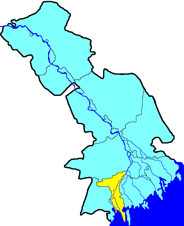 Икрянинский район на карте Астраханской области.